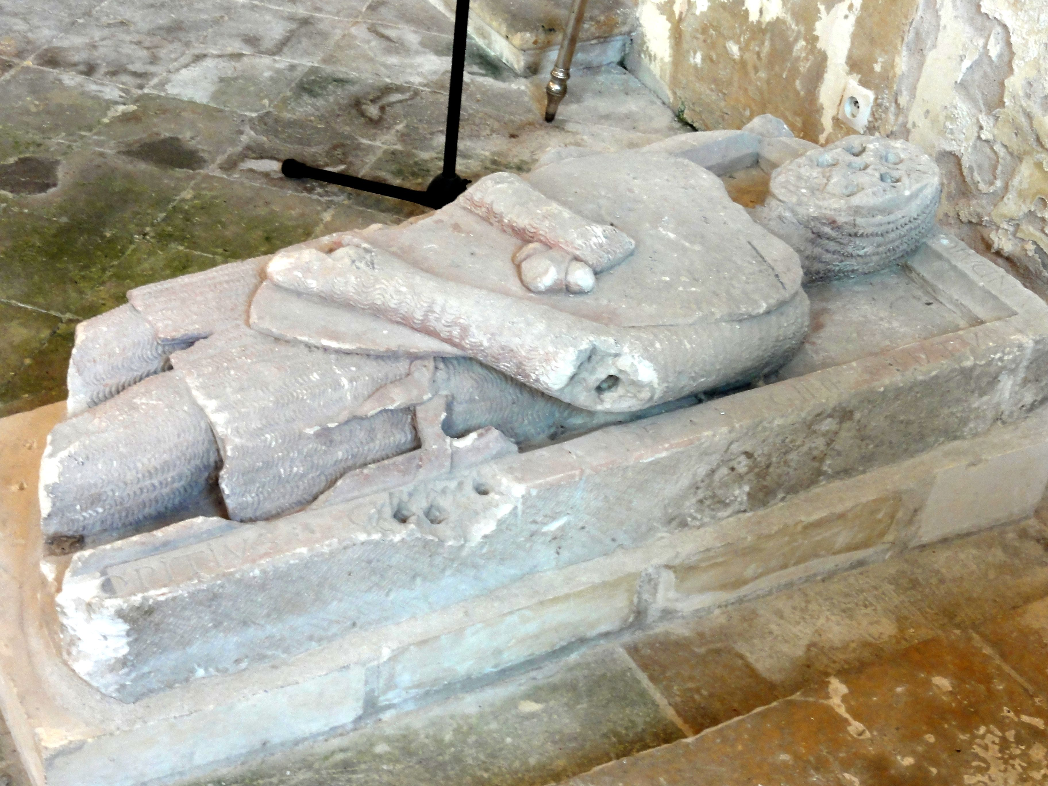 Gisant de Guy de La Tour, devant le chevet de la chapelle sud.